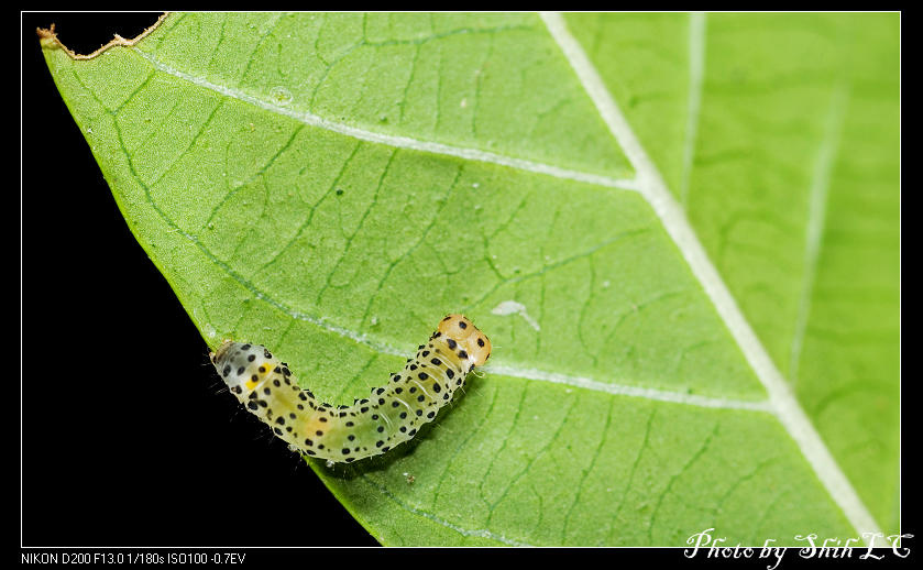 Monobolodes prunaria (Moore, 1887) 褐寬帶雙尾蛾